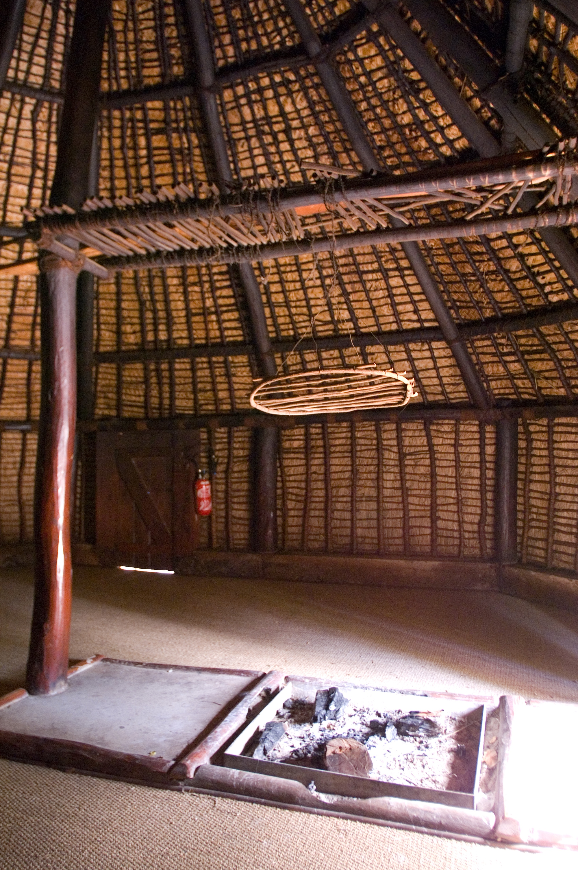 Centre culturel Tjibaou, Nouméa, New Caledonia.